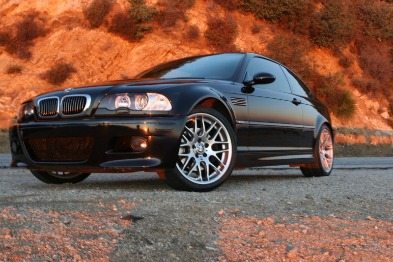 BMW-M3-CSLWheels.jpg